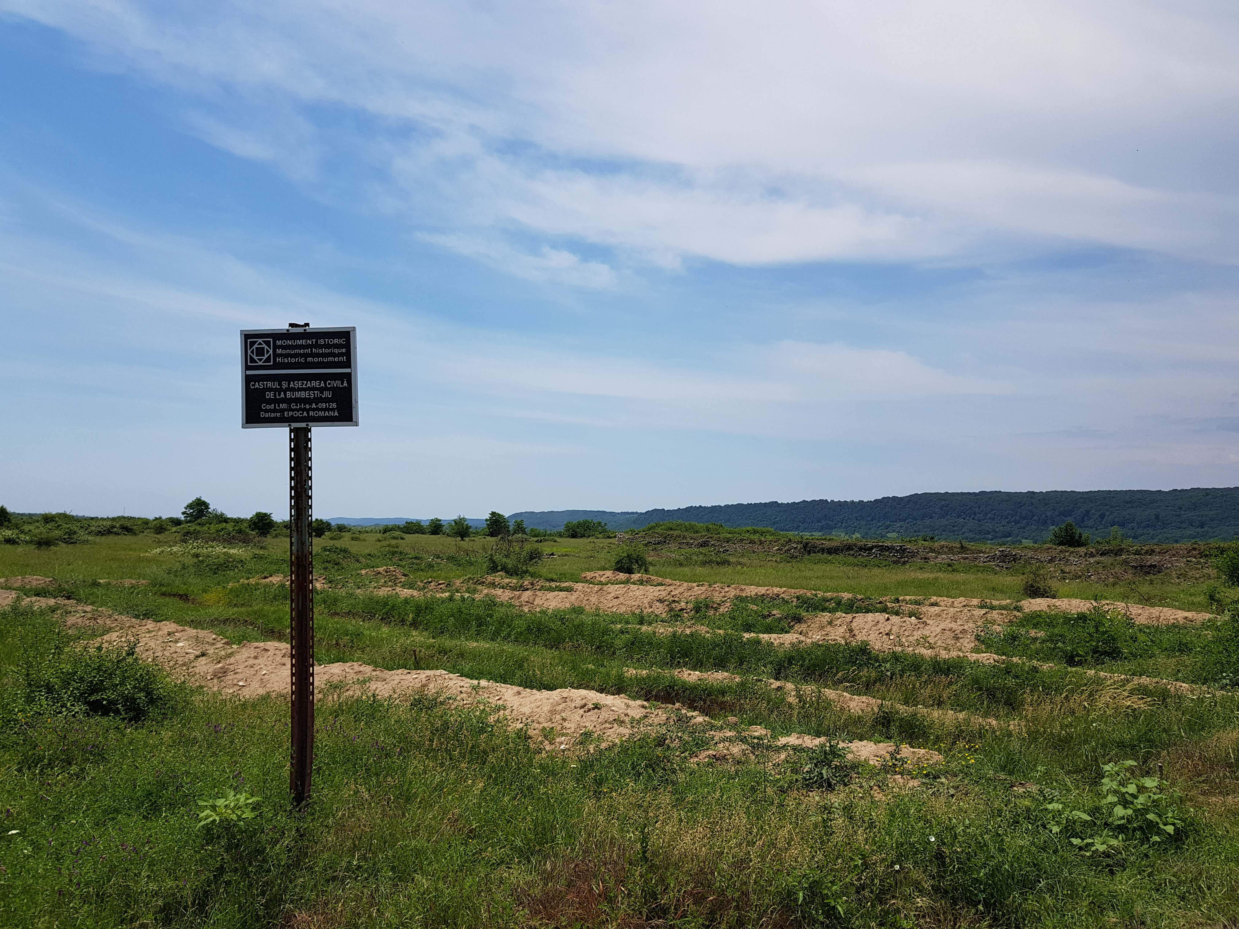 Castrul și așezarea civilă de la Bumbești-Jiu